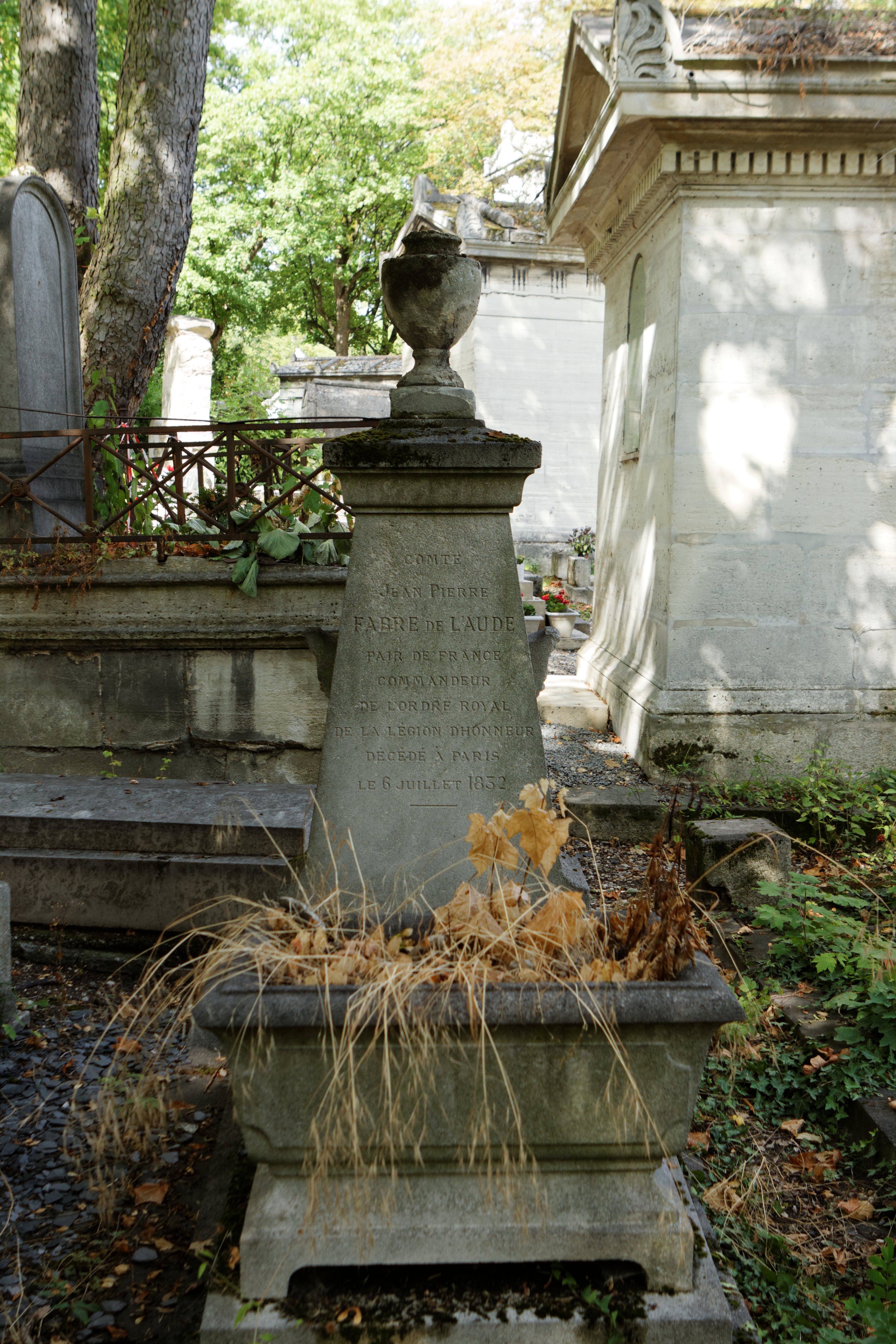 Sépulture de Jean-Claude Fabre de l'Aude (1755-1832), révolutionnaire ; Charles-Ferdinand Fabre de l'Aude (-1834), peintre ; Charles-Ferdinand Fabre de l'Aude (1835-1894), peintre.